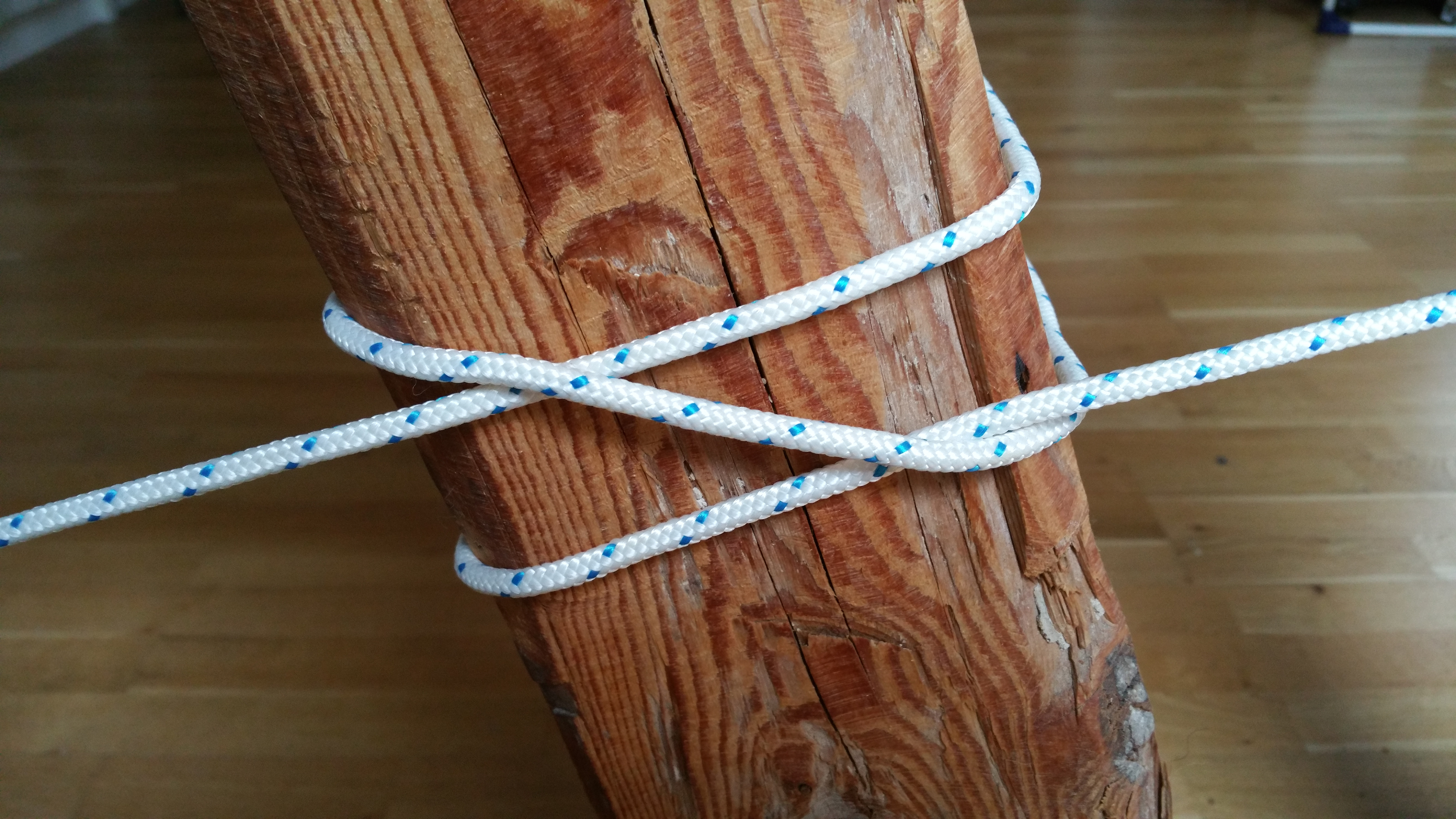 Webeleinenstek mit zwei rechten Törns. Unterstes Seil befindet sich rechts